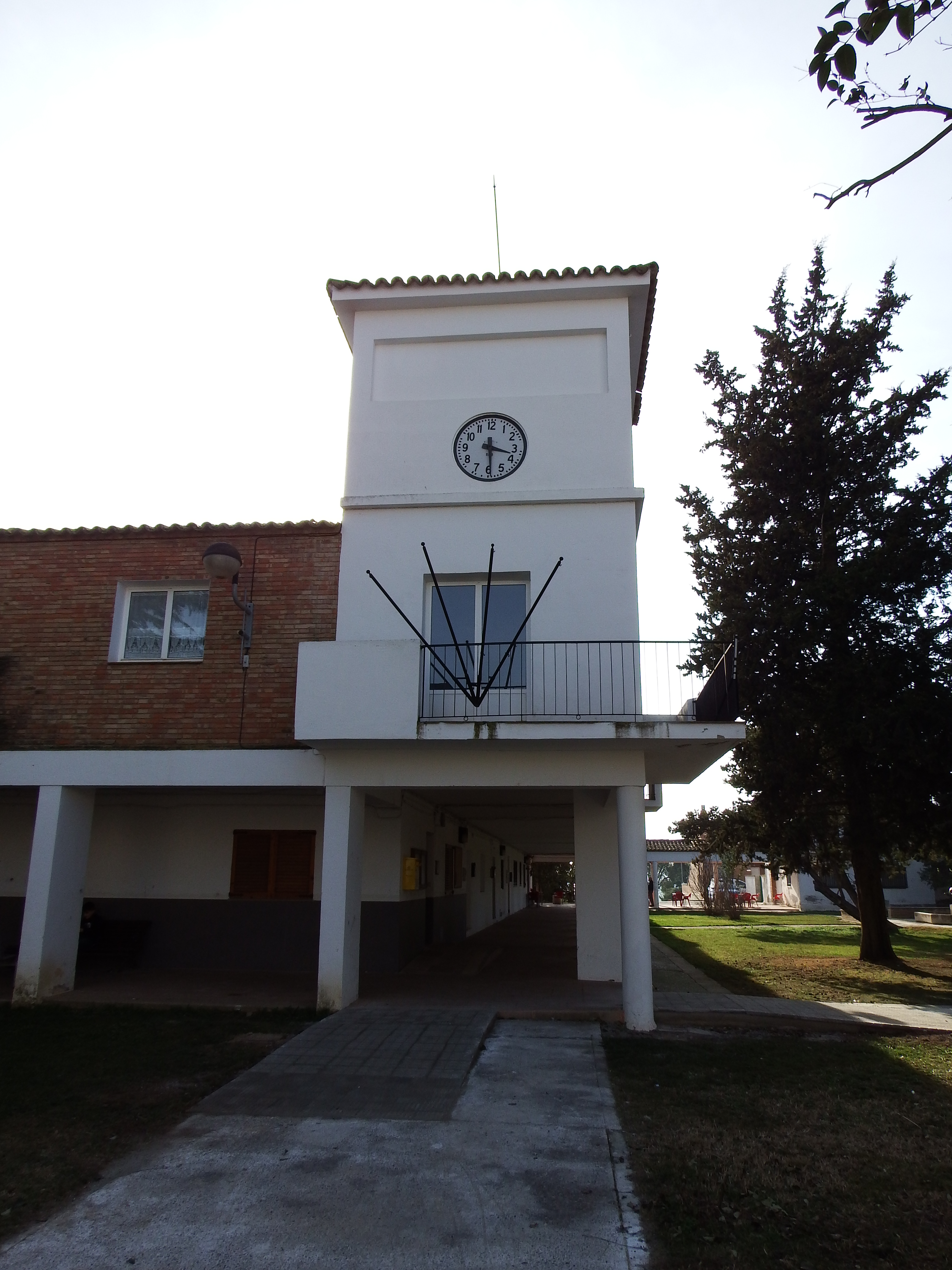 Vencillón, Ayuntamiento